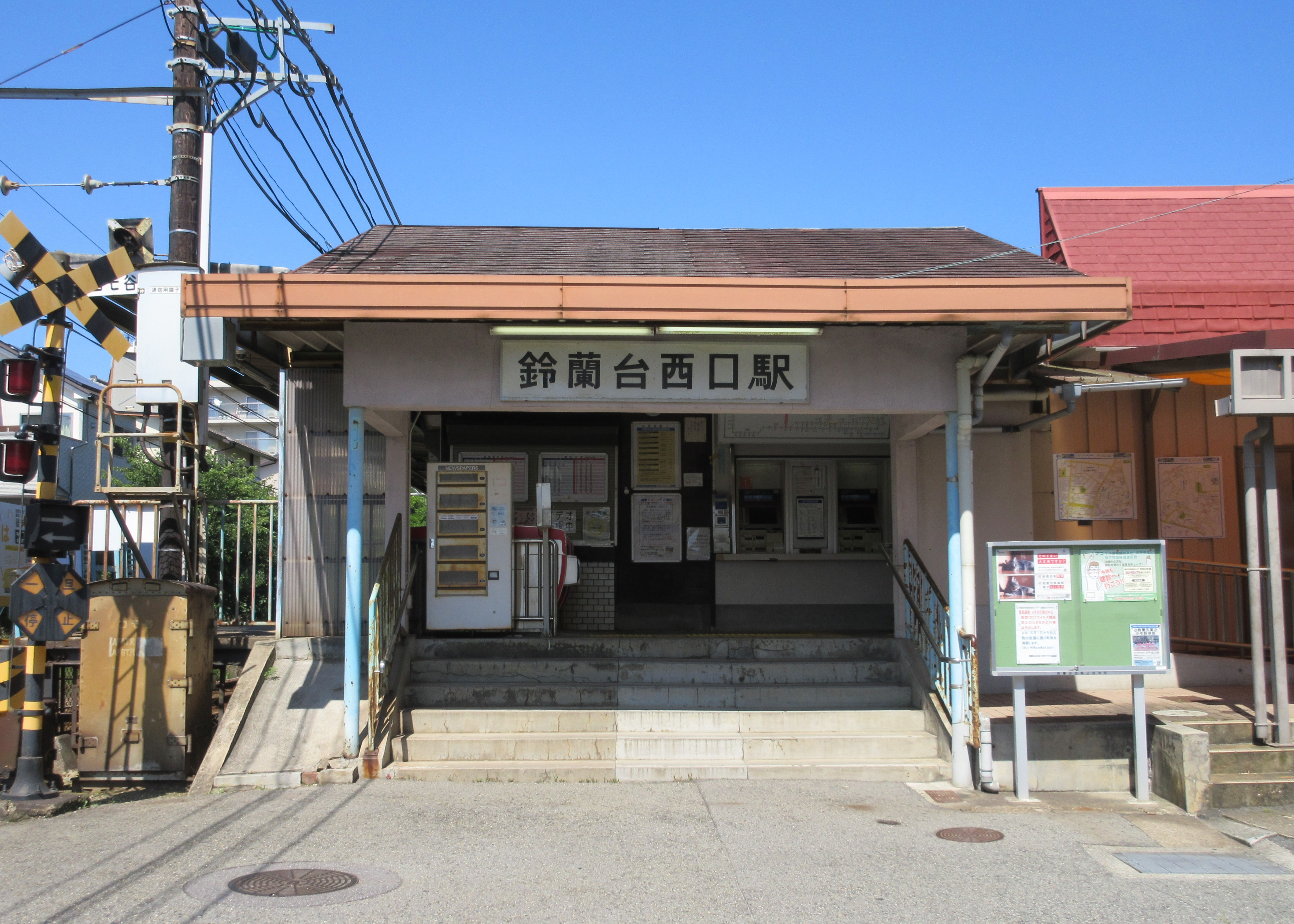 鈴蘭台西口駅